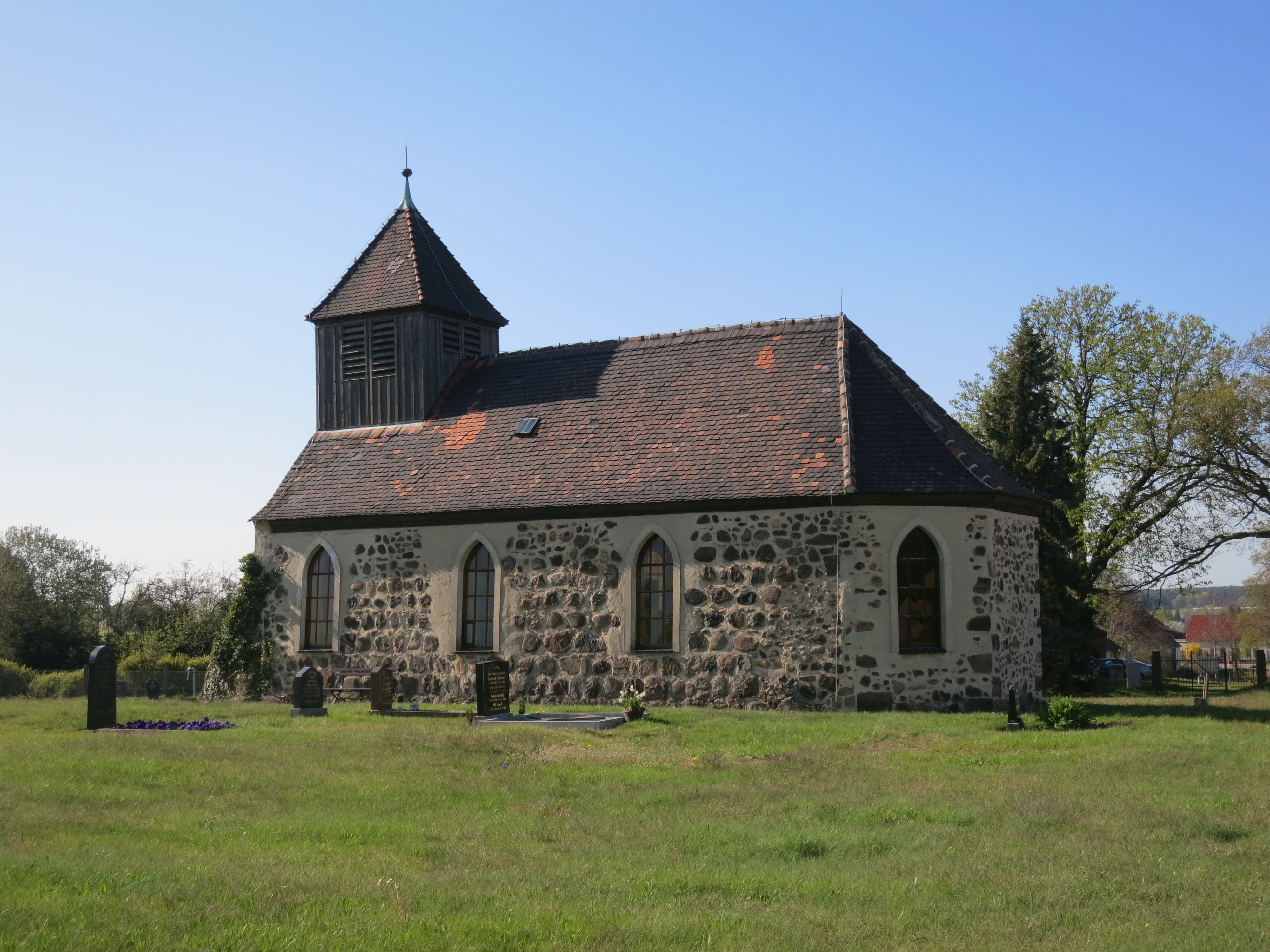 Kirche in Schwabeck, Stadt Treuenbrietzen